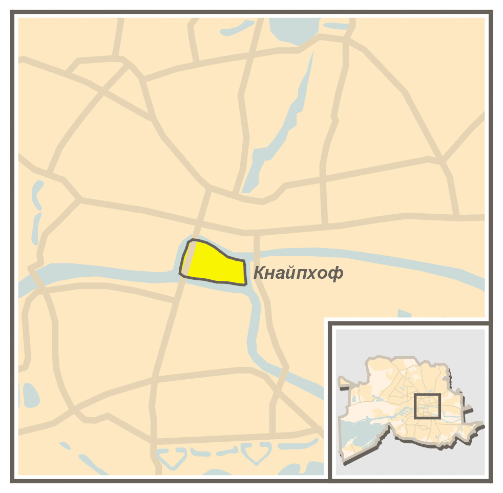 Положение городского района Кнайпхоф (Кенигсберг)